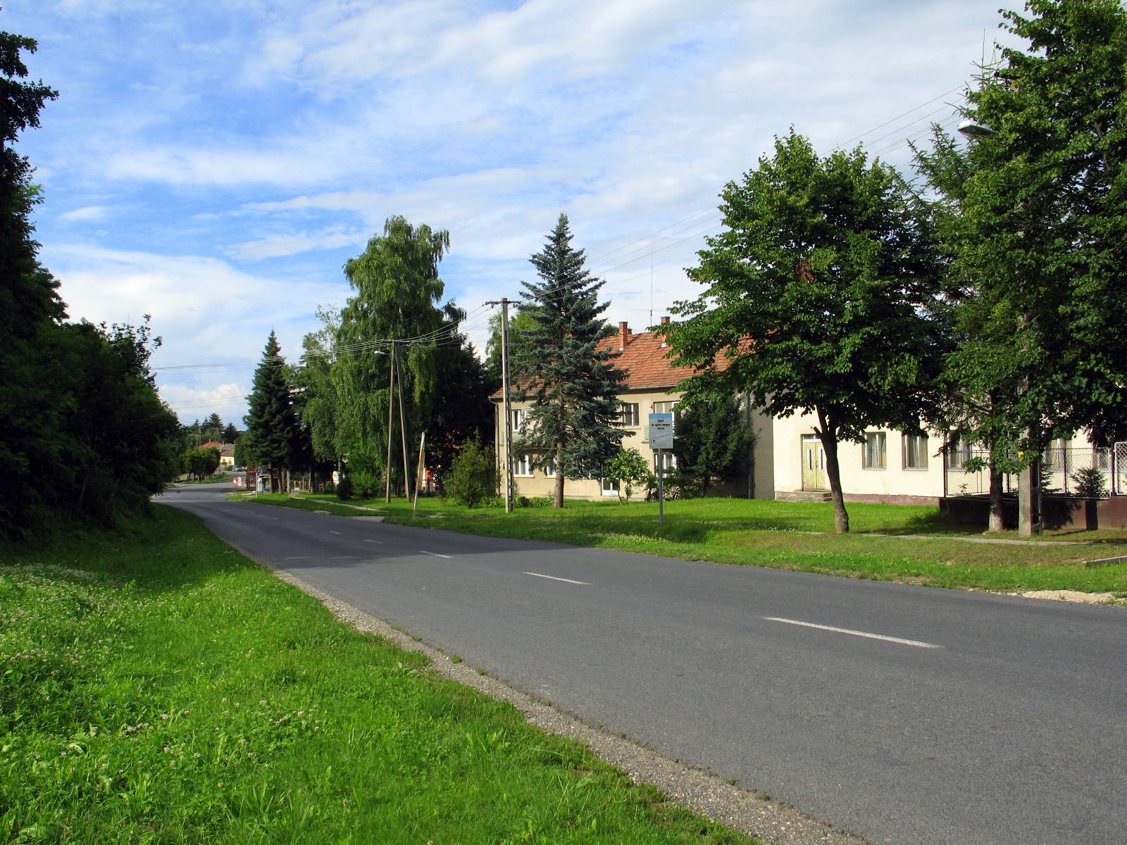 Nagyrada. Foto Victor Belousov